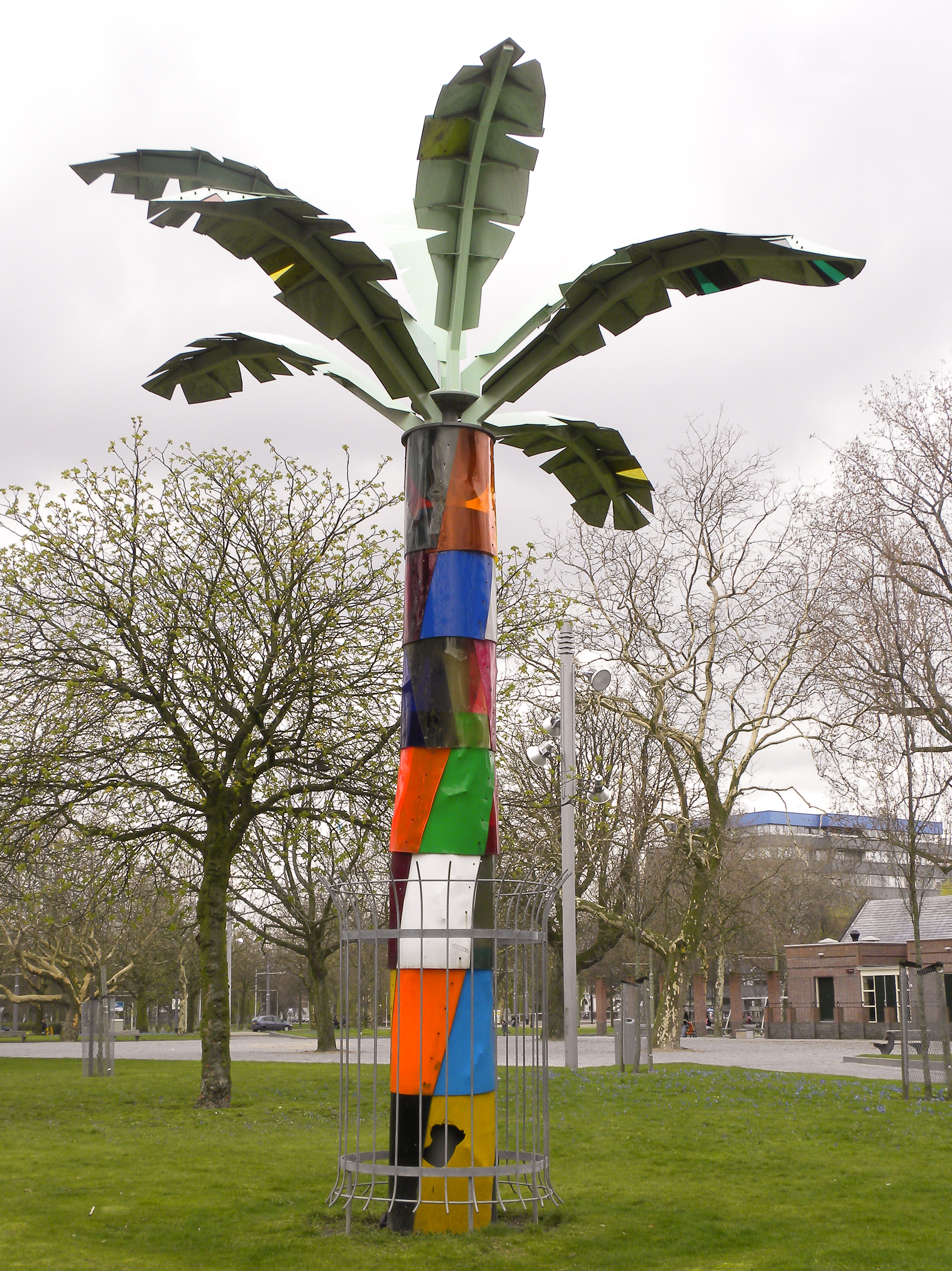 De Palm, kunstwerk herinrichting Heemraadsplein Rotterdam 1997 door Klaar van der Lippe